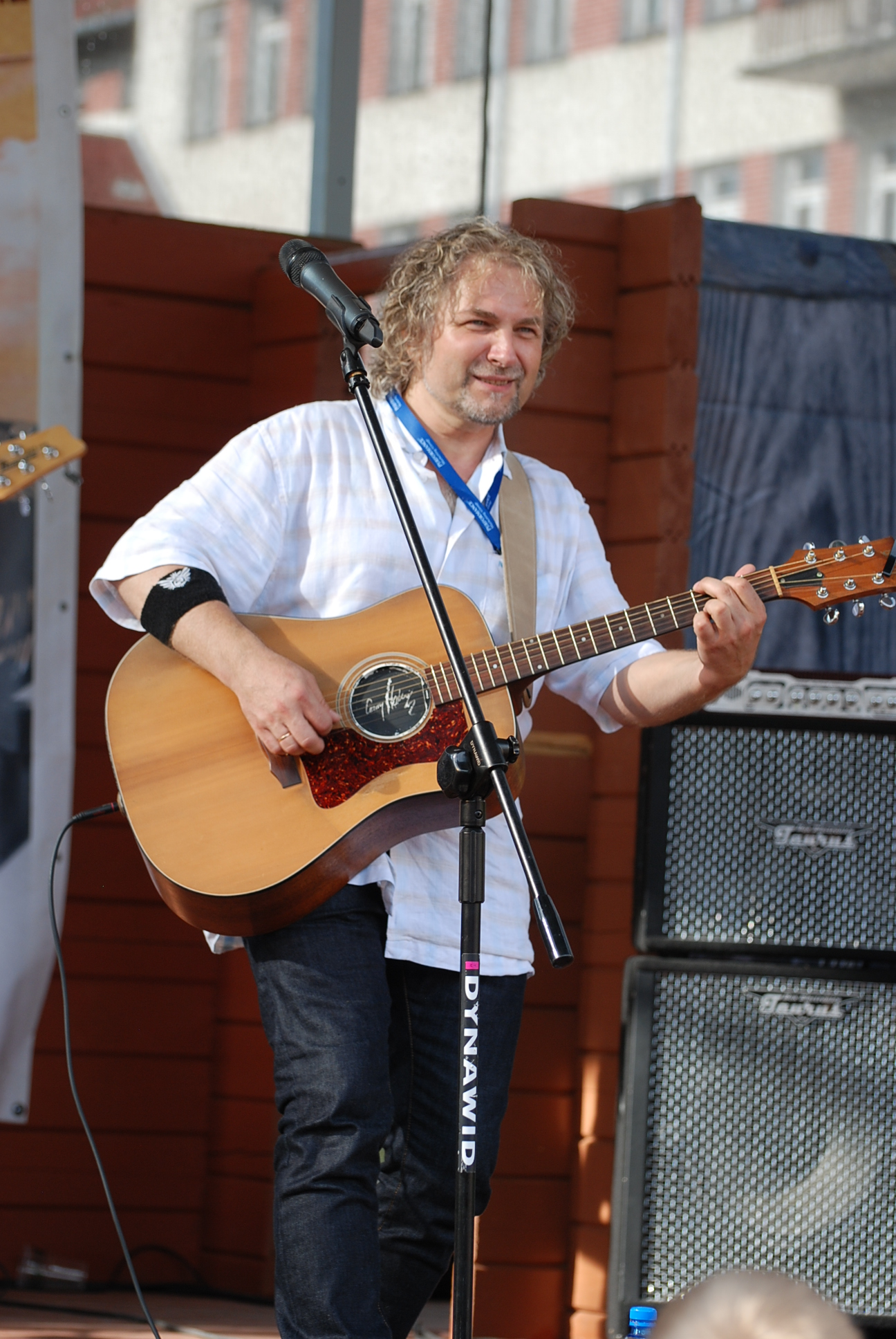 Cezary Makiewicz, Koncert Piknik w Mieście, Mrągowo 2012 fot.Ewa Mazurek